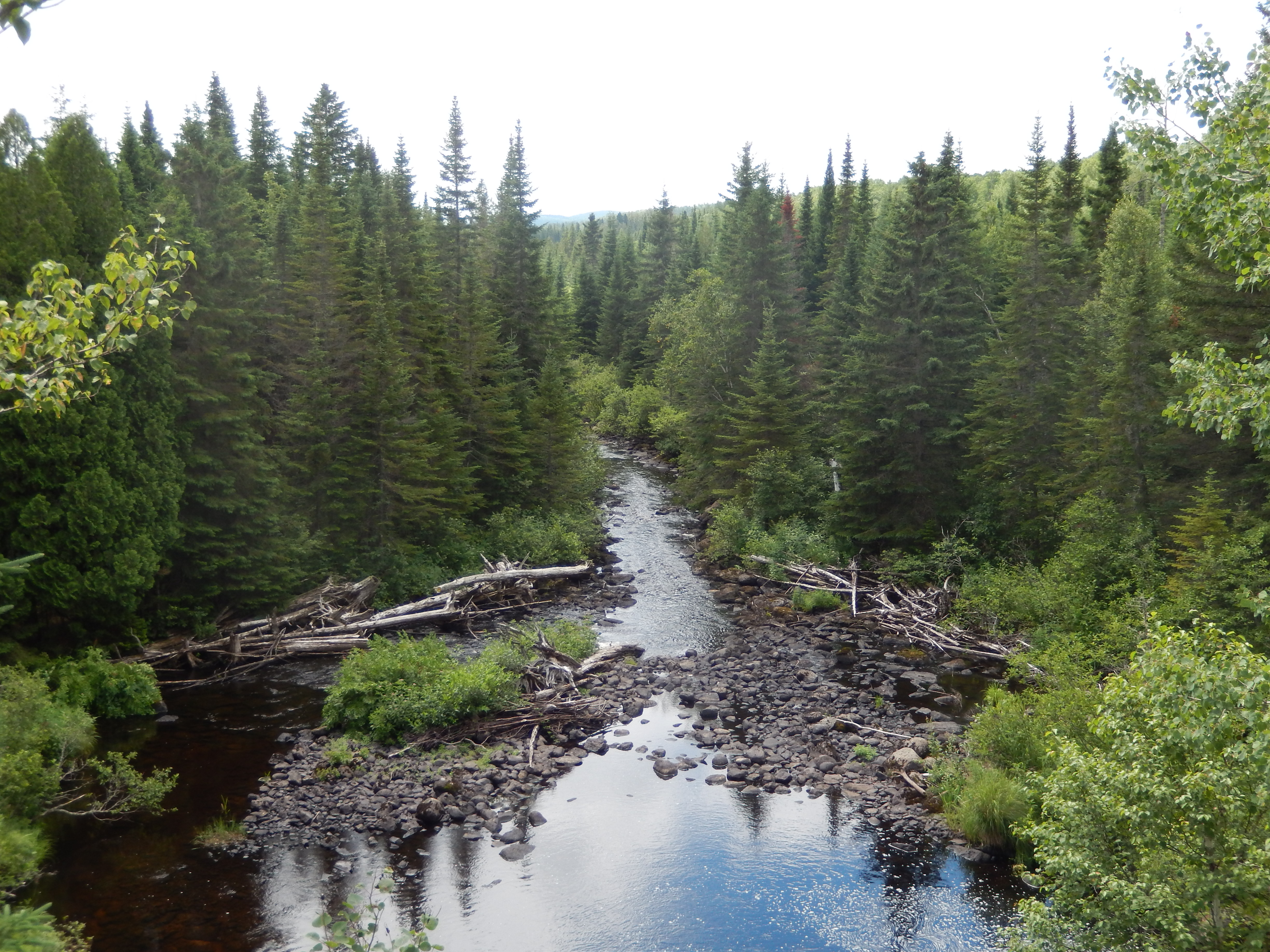 Rivière Saint-François à partir du belvédaire sur le Petit-Témis